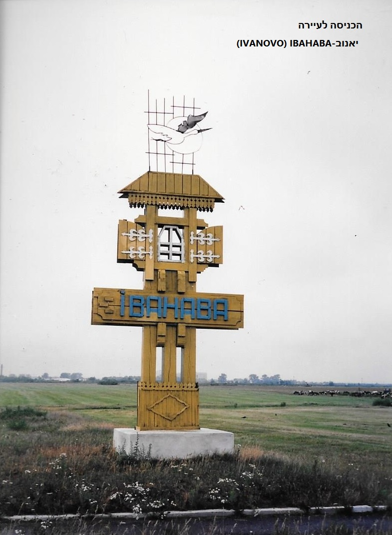 השילוט בכניסה לעיירה